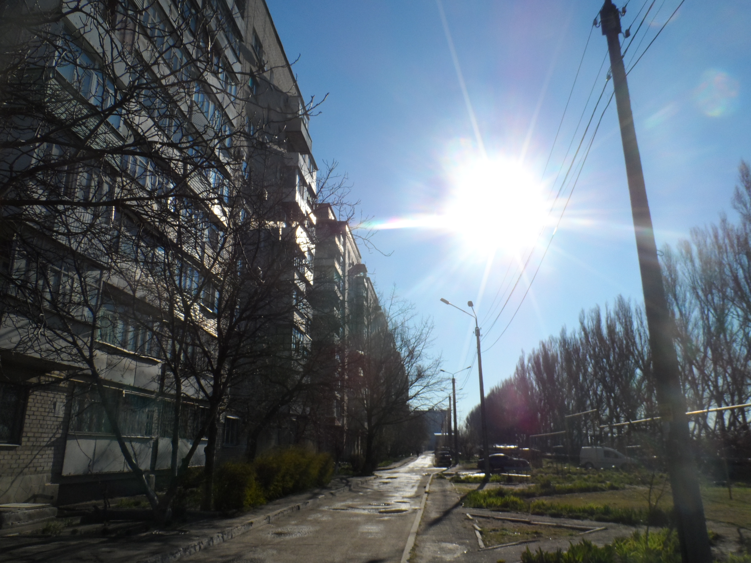 Улица Брив-ла-Гайард